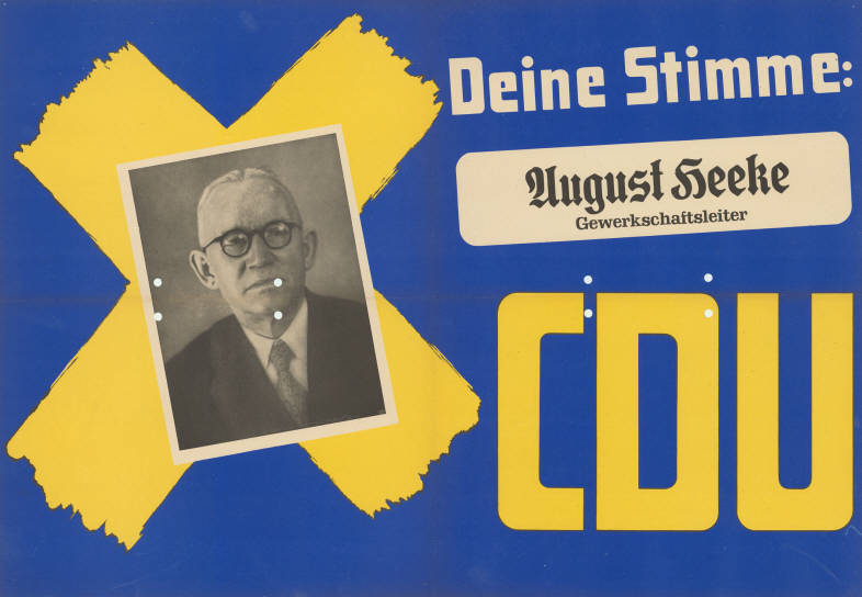 Deine Stimme: August Heeke Gewerkschaftsleiter CDU Abbildung: Porträtfoto - Stimmkreuz Plakatart: Kandidaten-/Personenplakat mit Porträt Objekt-Signatur: 10-009 : 198 Bestand: Landtagswahlplakate Nordrhein-Westfalen (10-009) GliederungBestand10-18: Landtagswahlplakate Nordrhein-Westfalen (10-009) » Landtagswahl am 18.6.1950 » CDU » mit Porträtfoto Lizenz: KAS/ACDP 10-009 : 198 CC-BY-SA 3.0 DE